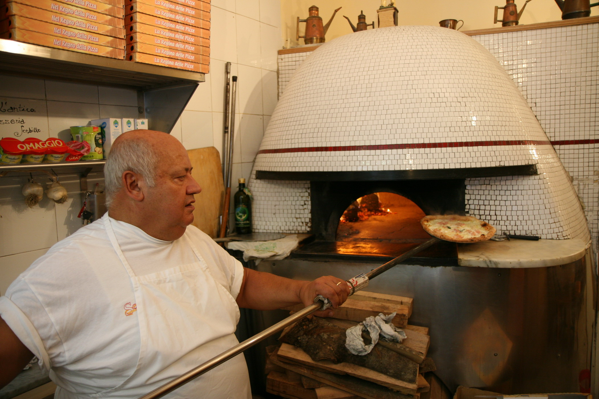 Woodfired pizza oven at Pizzeria Sorbillo, Naples